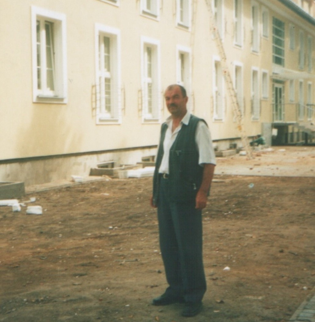 Dyrektor mgr Andrzej Wierzbicki